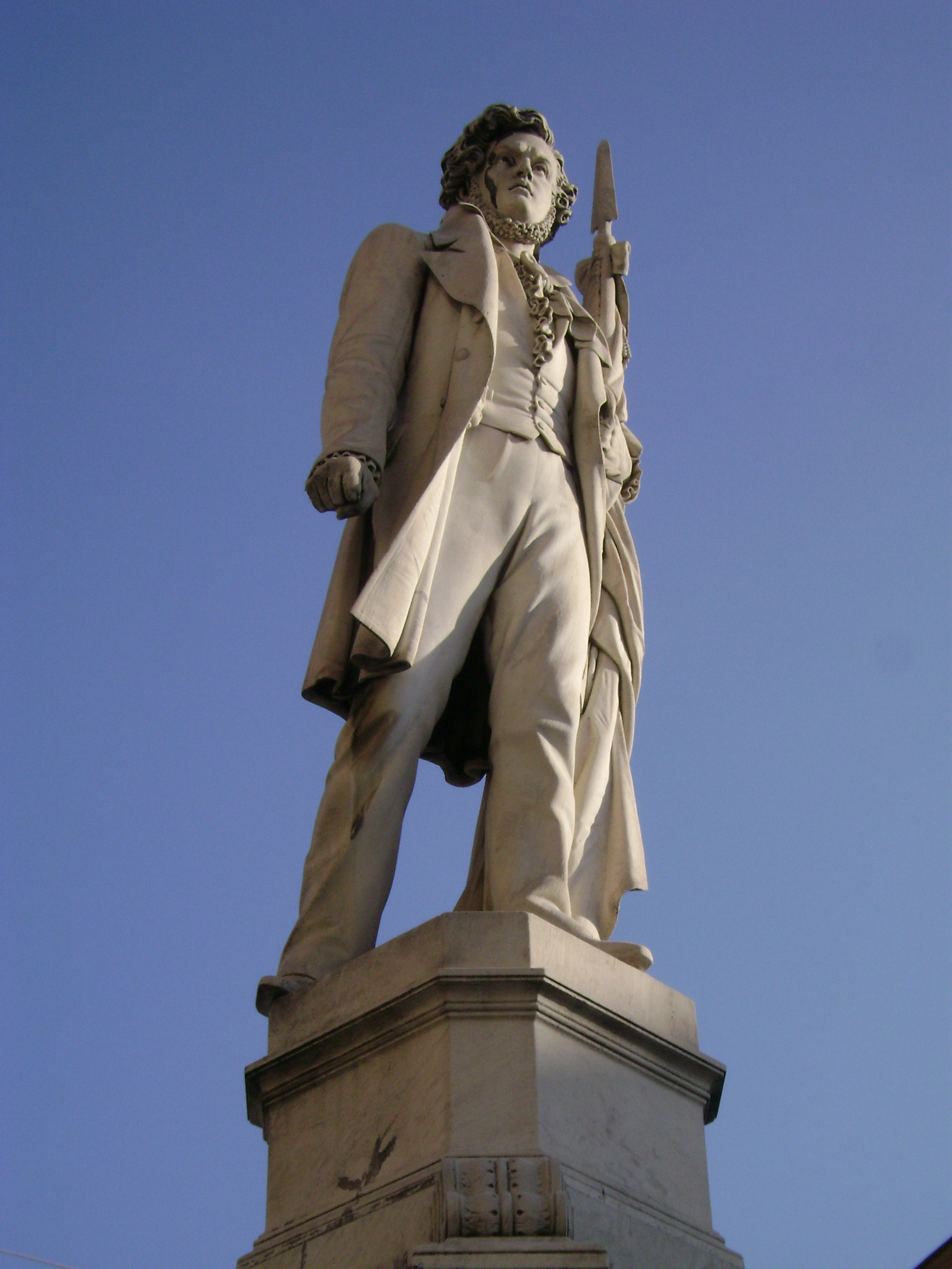 Monumento a Ciro Menotti, Modena, Piazza Roma